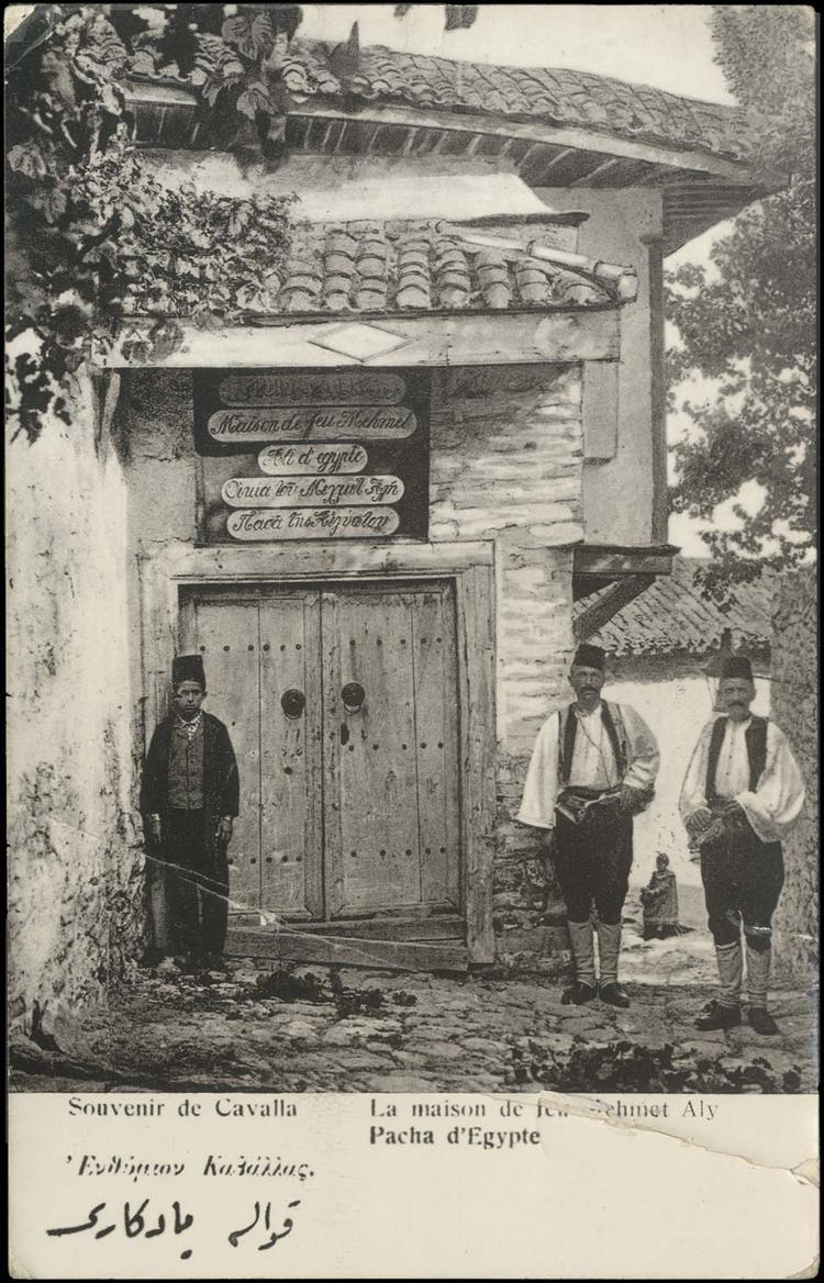 Къщата на Мохамед Али паша в Кавала